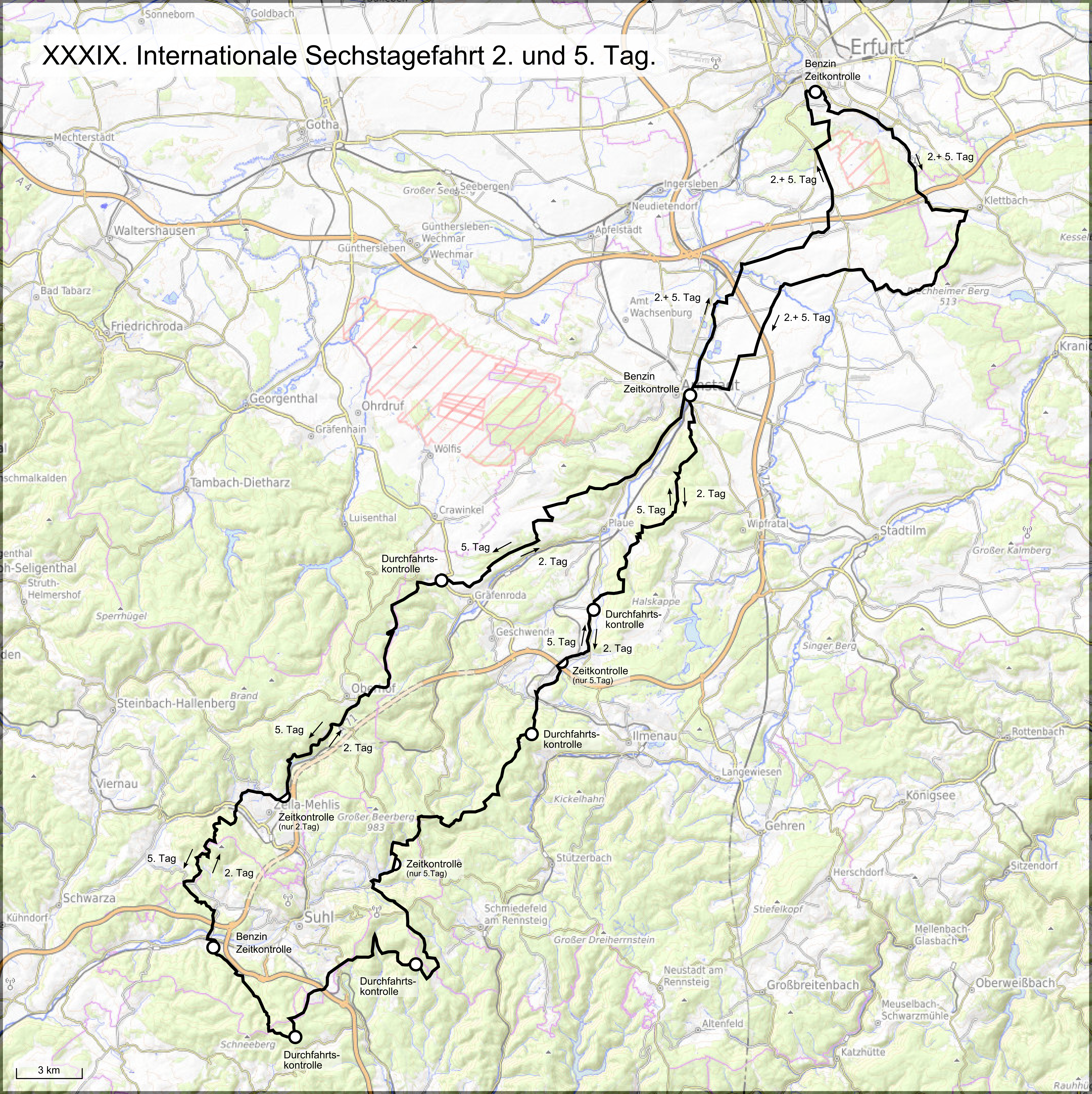 Karte der 39. Internationale Sechstagefahrt, Route des 2. und 5. Tages